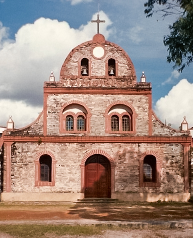 Capilla de la comunidad Pemón de Kavanayen, en el municipio Gran Sabana - Estado Bolívar - Venezuela